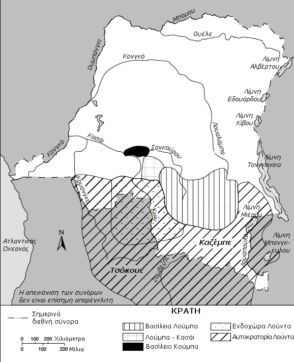 Χάρτης της Αυτοκρατορίας Λούντα